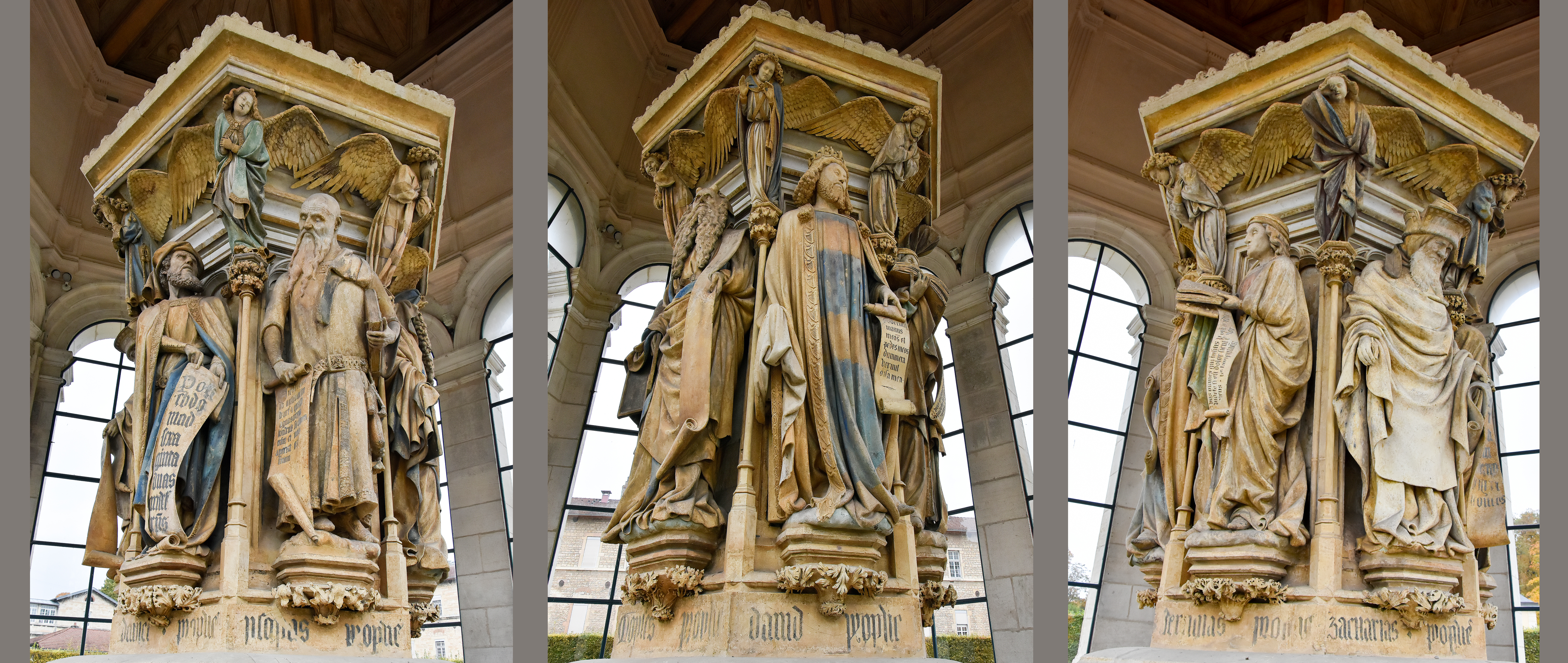 Claus Sluter (1350-1406) Mozesput Champmol Dijon